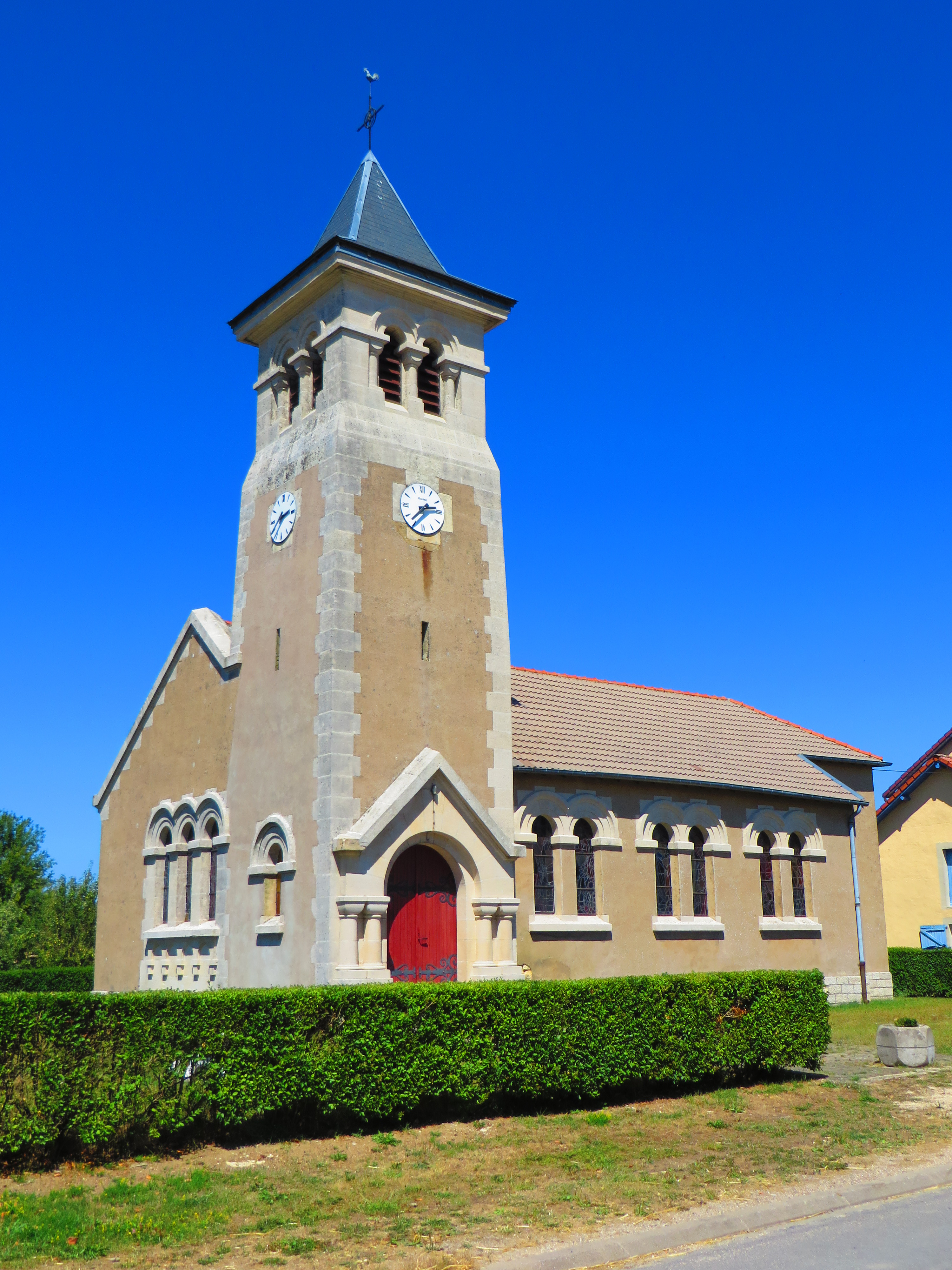 Damloup L'église Saint-Loup